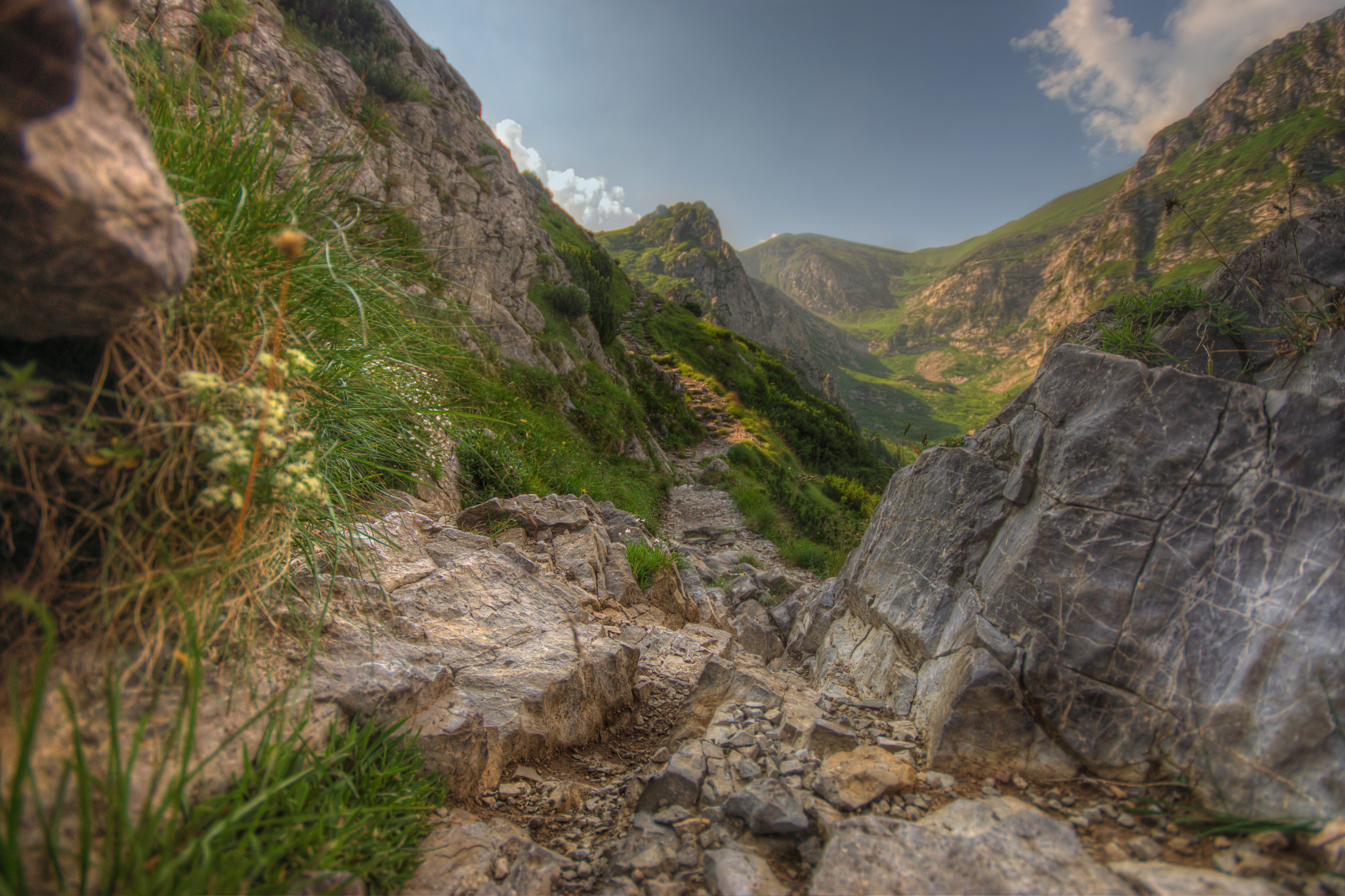 Specjalny obszar ochrony siedlisk Tatry. This is a photography of Natura 2000 protected area with ID PLC120001